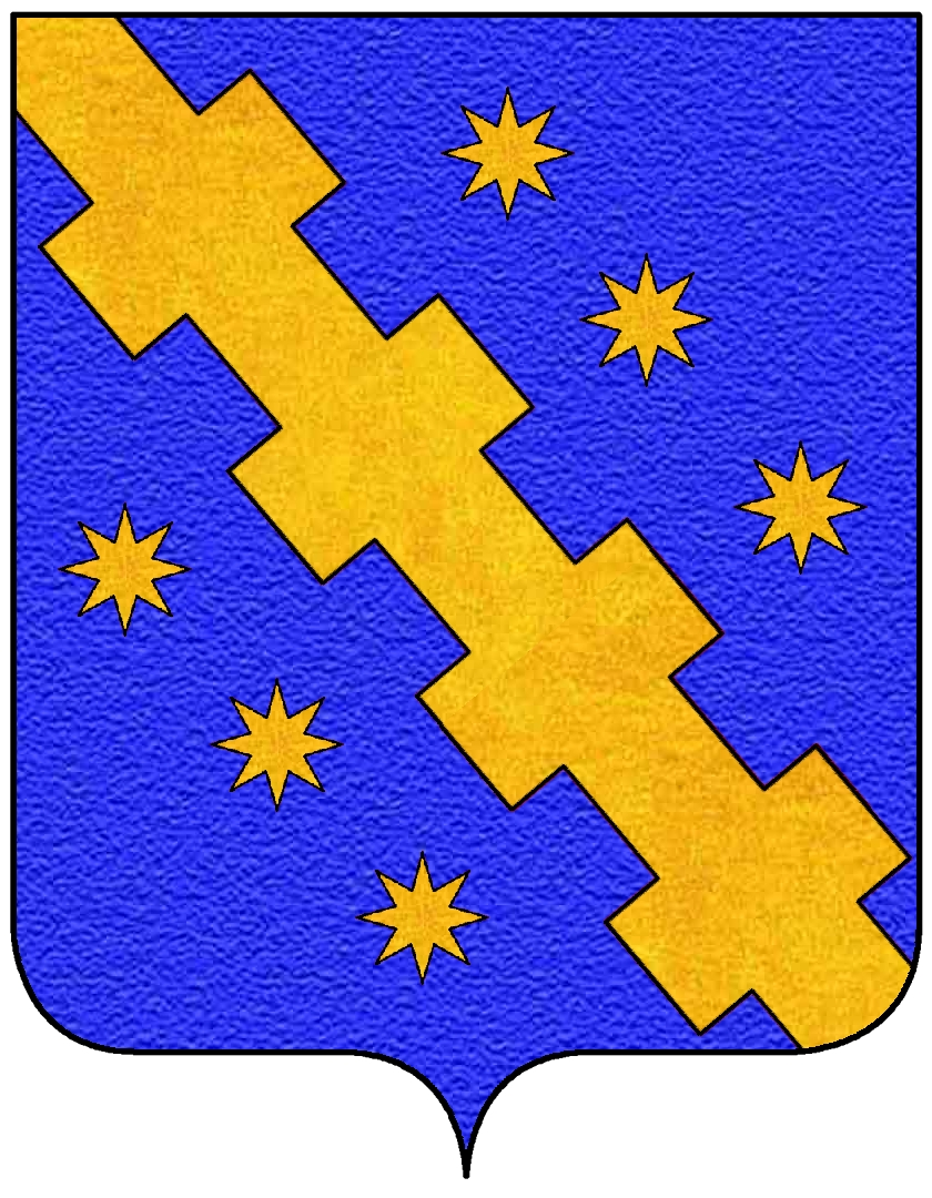 Stemma della famiglia Aldobrandini